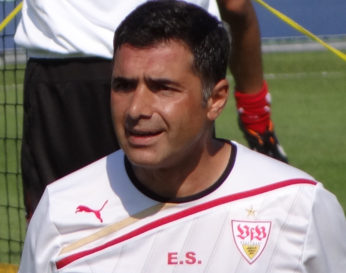 aufgenommen beim VfB-Training von